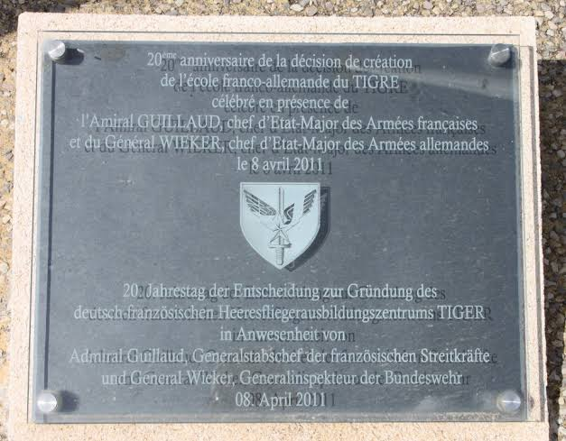 placa de inauguração da Escola Franco-Alemã de Treinamento de Tripulações de Helicóptero Tigre